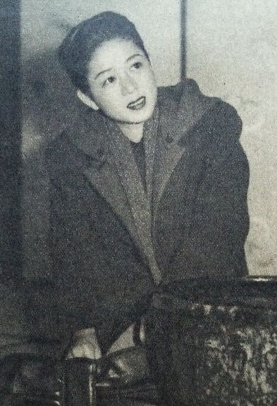 高杉妙子